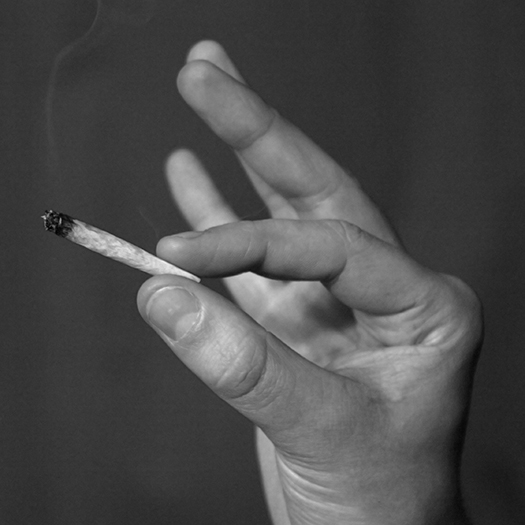 A marijuana joint